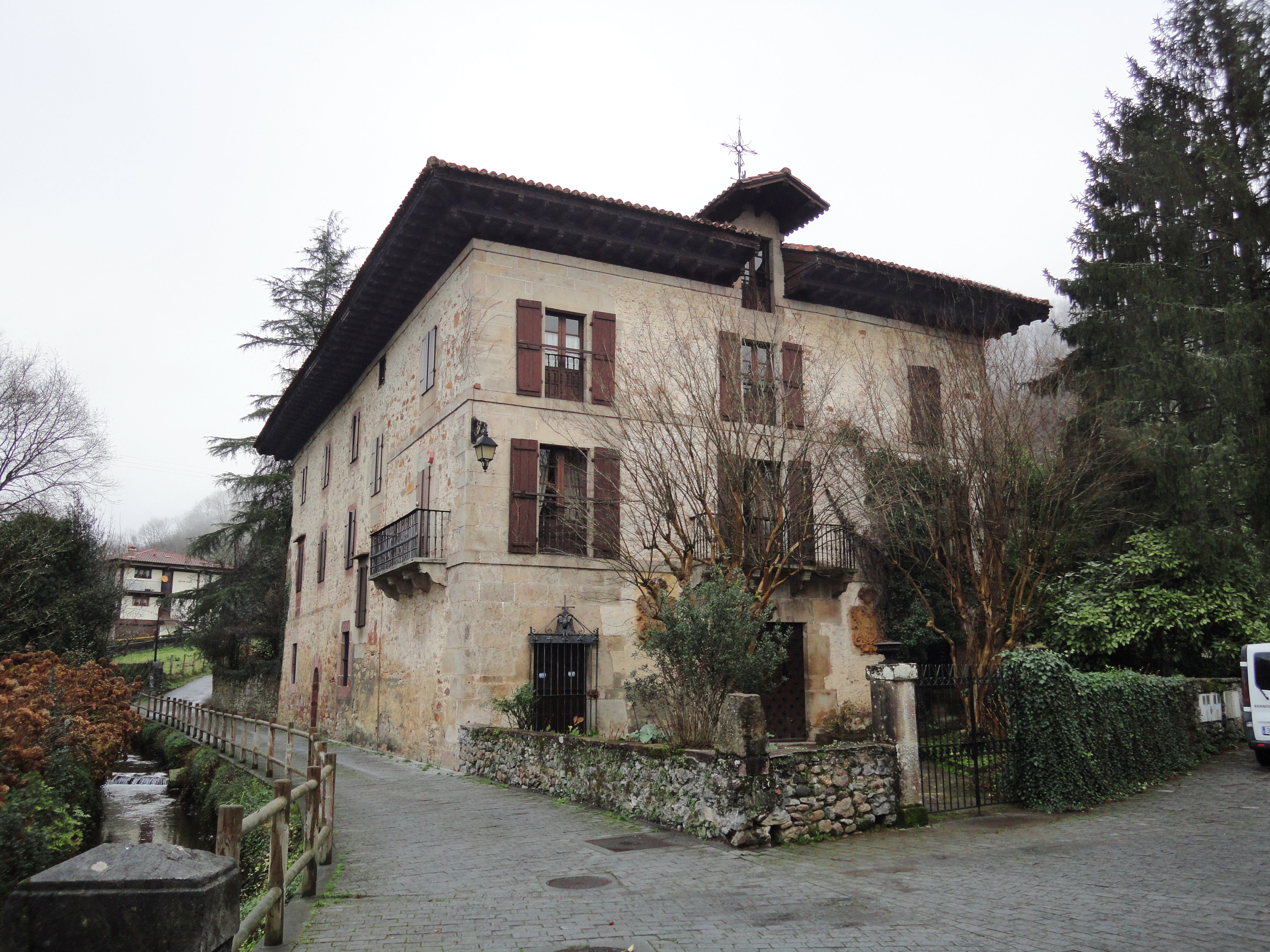 Itzea etxea - Bera